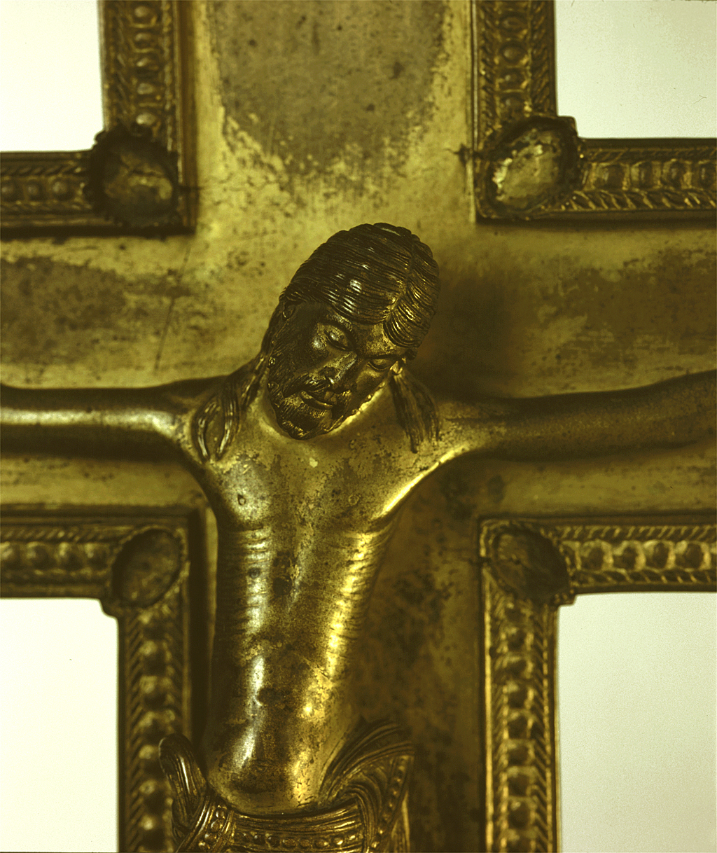 Kruzifix Detail des Kopfes (um die künstlerische Meisterschaft in Ausführung vor Augen zu führen)